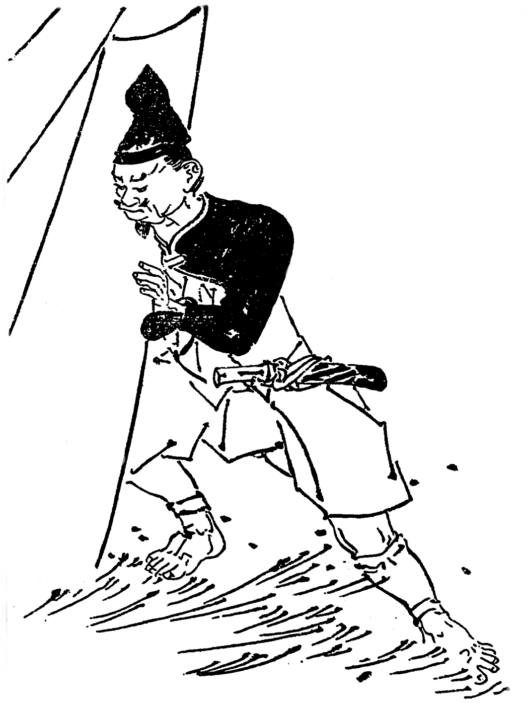 平盛俊。平安時代末期の武将。／江戸時代『前賢故実』より。画：菊池容斎